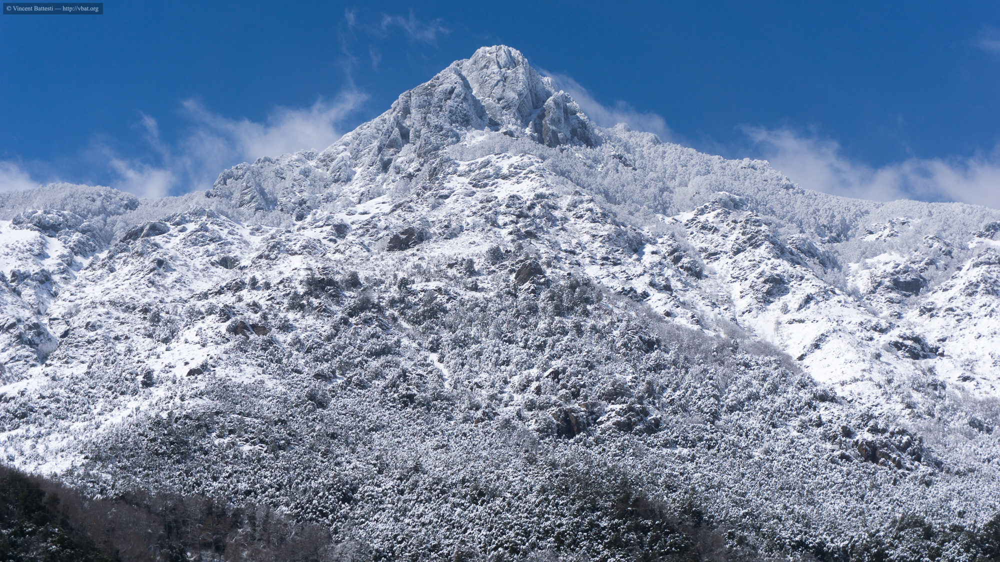 Le sommet du San Petrone (versant oriental depuis la commune de Nocario (hameau de Nucariu) sous la neige (22 mars 2018).